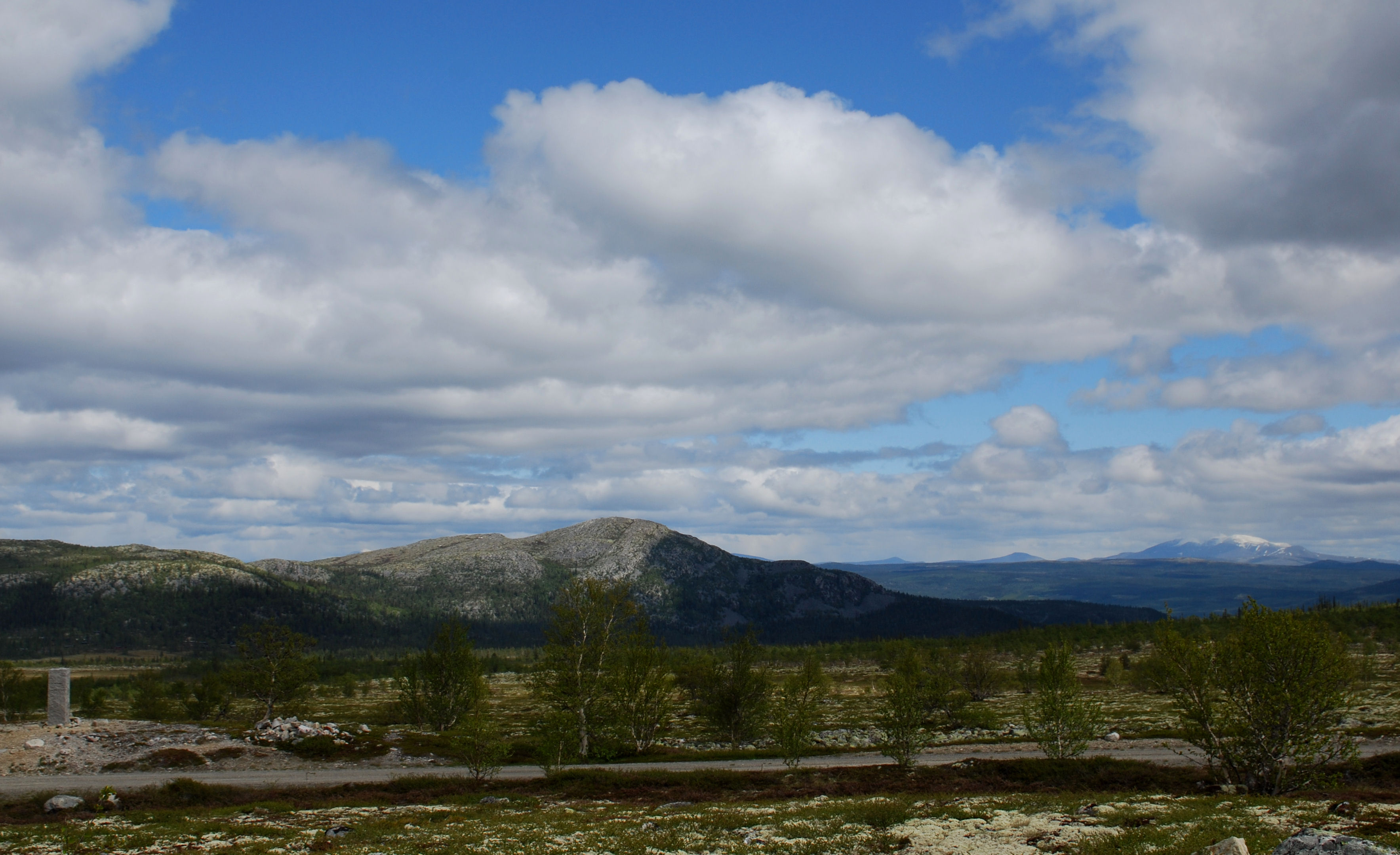 Bilde tatt fra Vinjevegen. Vinjestøtta i forgrunnen til venstre.